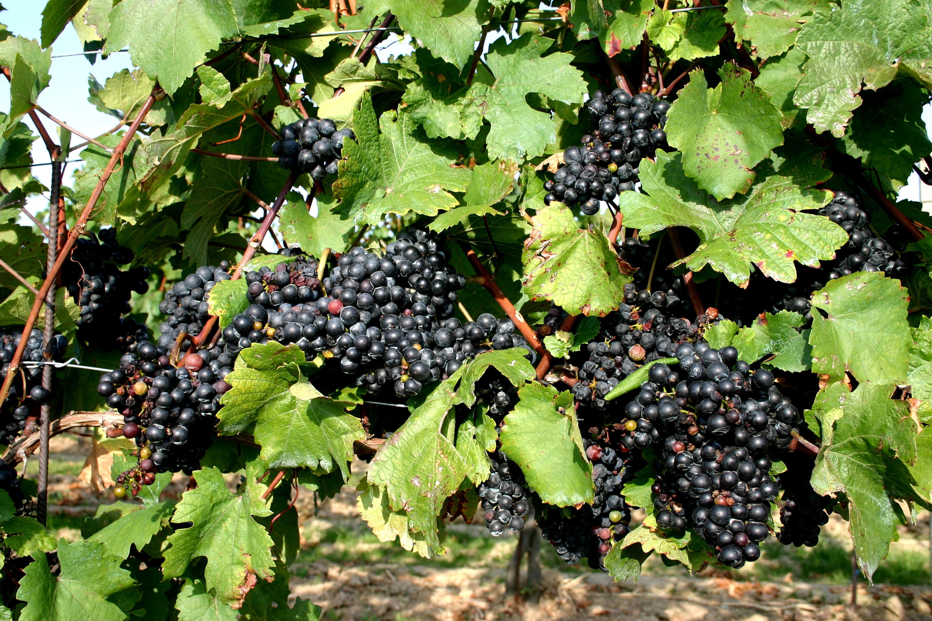 Lutzmannsburg – Auf dem „Sonnberg“ reifen die Trauben des Blaufränkischen Weins heran; die Region gehört zum österreichischen Blaufränkischland